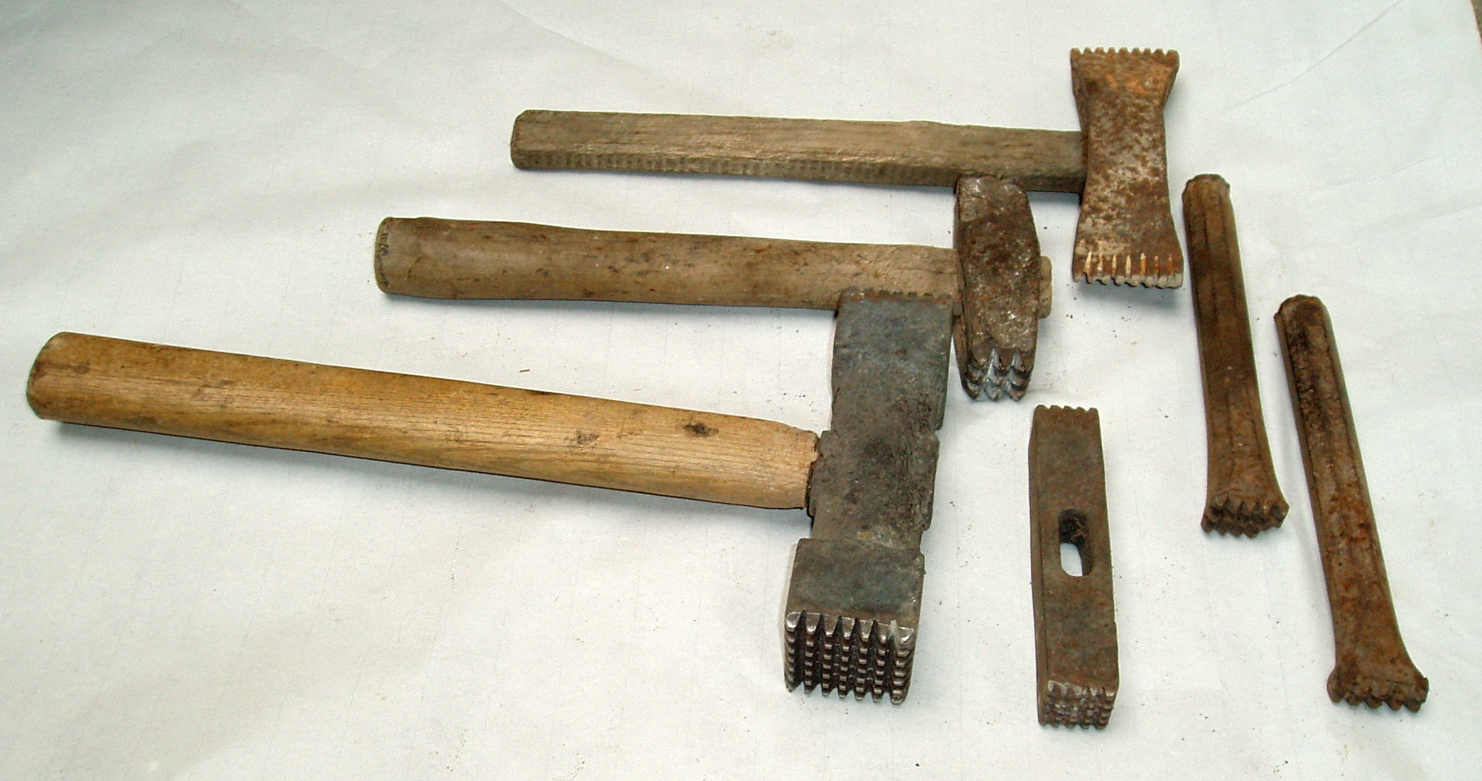 Kamenické nástroje - pemrlice